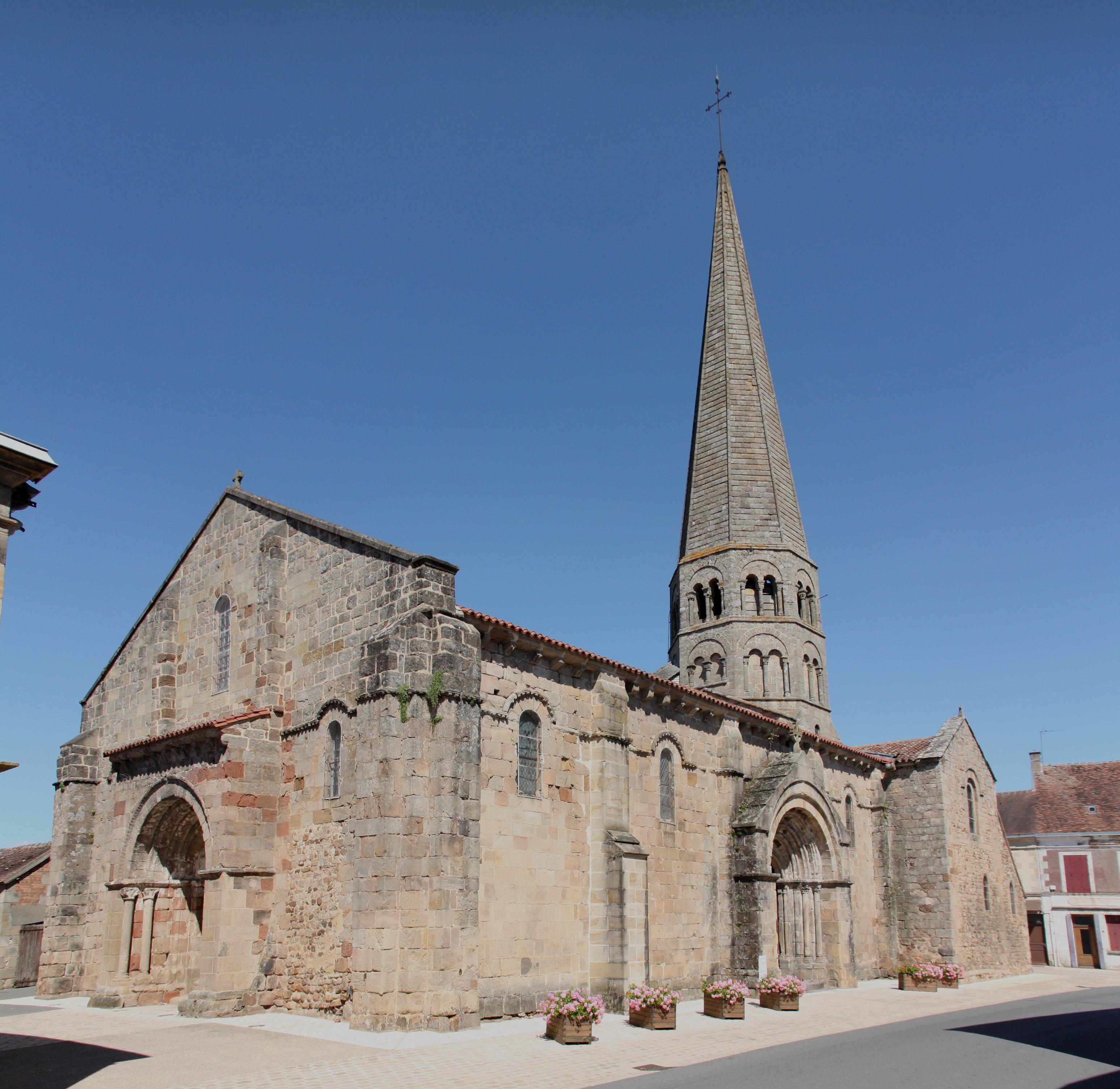 Église romane Saint Martin d’Ygrande, Allier, France